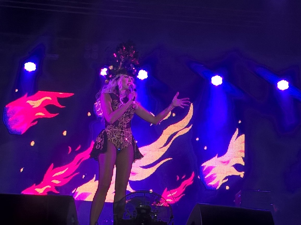 В Мелитополе